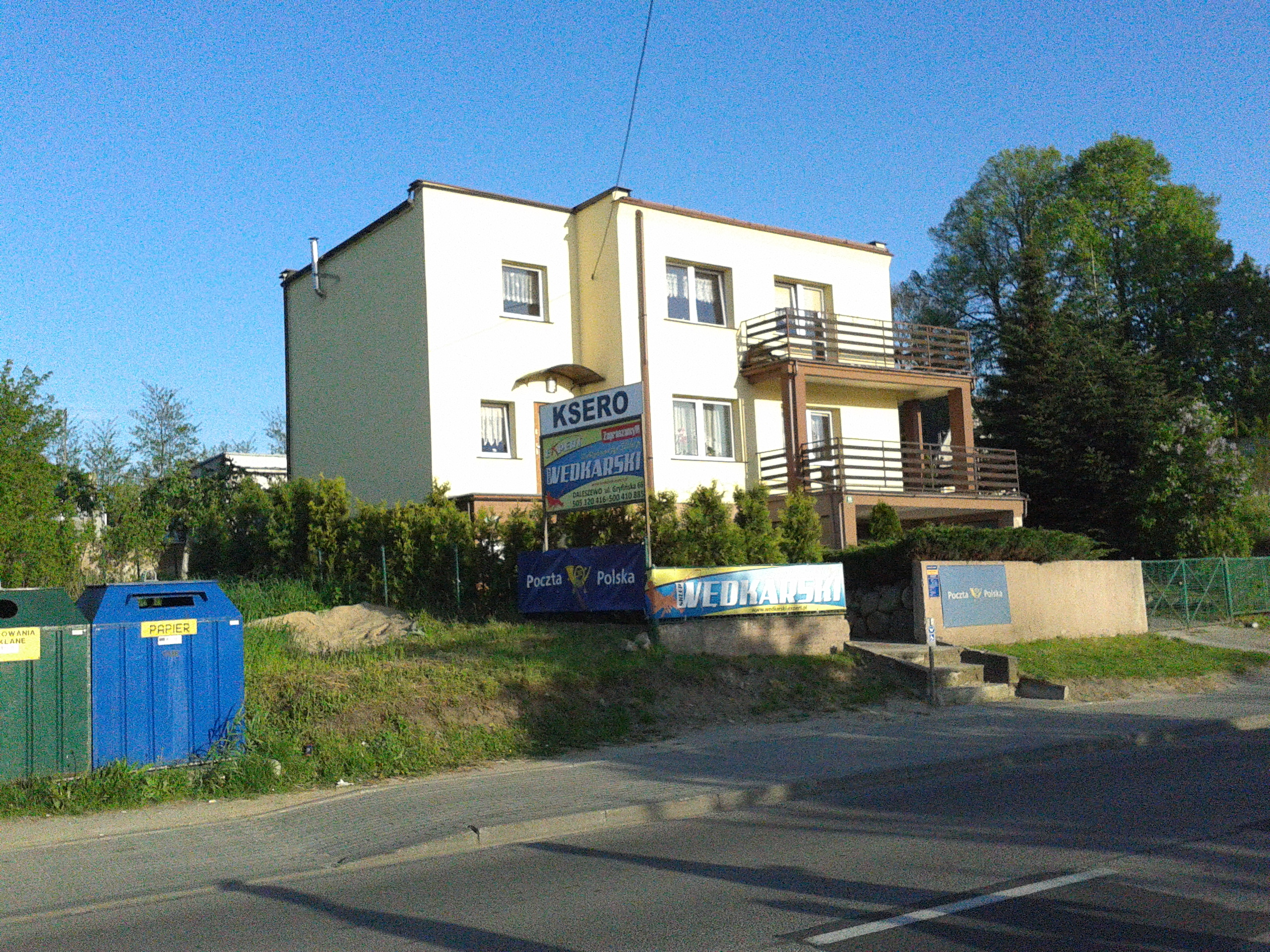 Poczta w Daleszewie